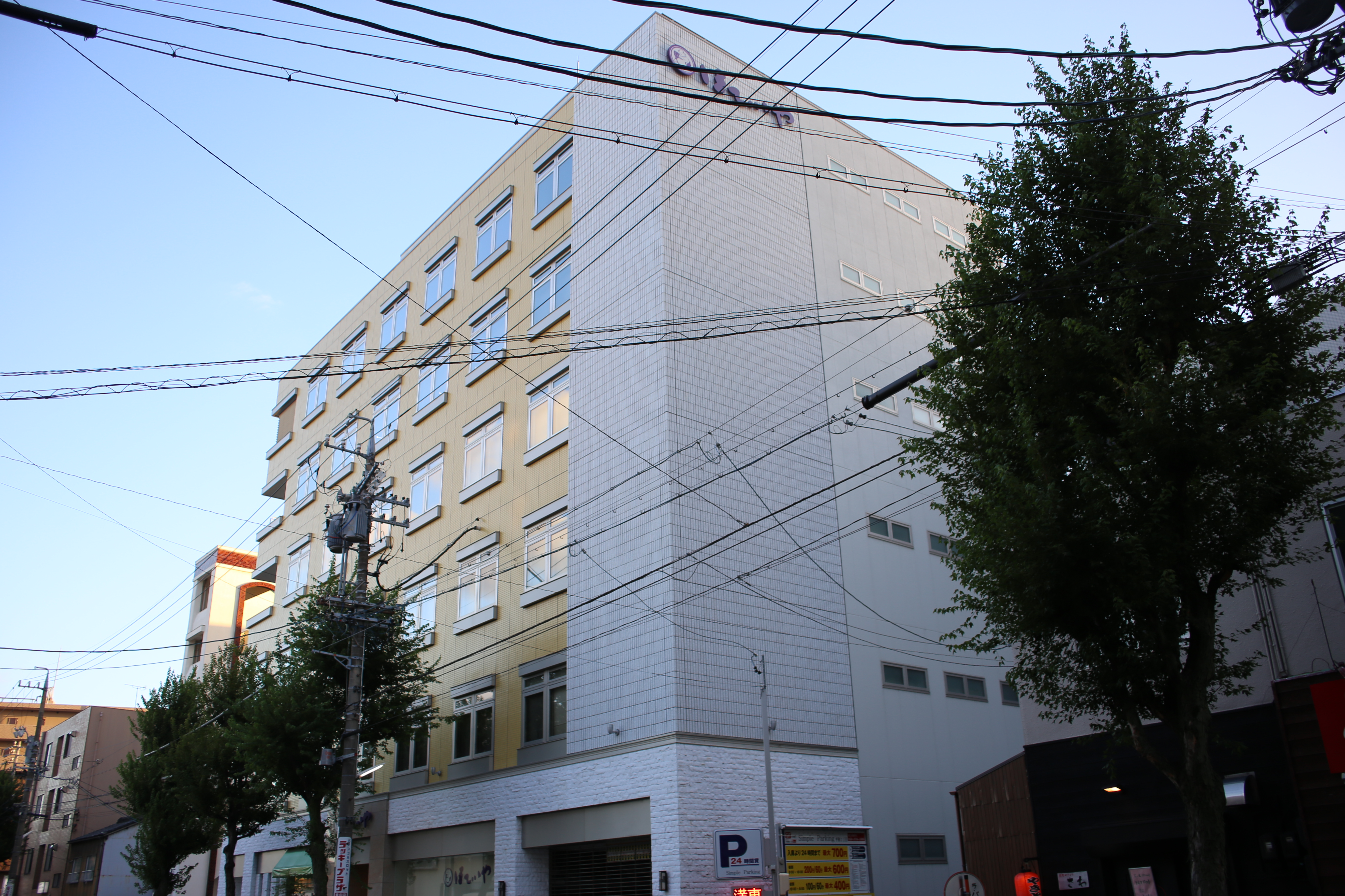 名古屋市中区平和二丁目のほていや本社を東側公道北側より撮影